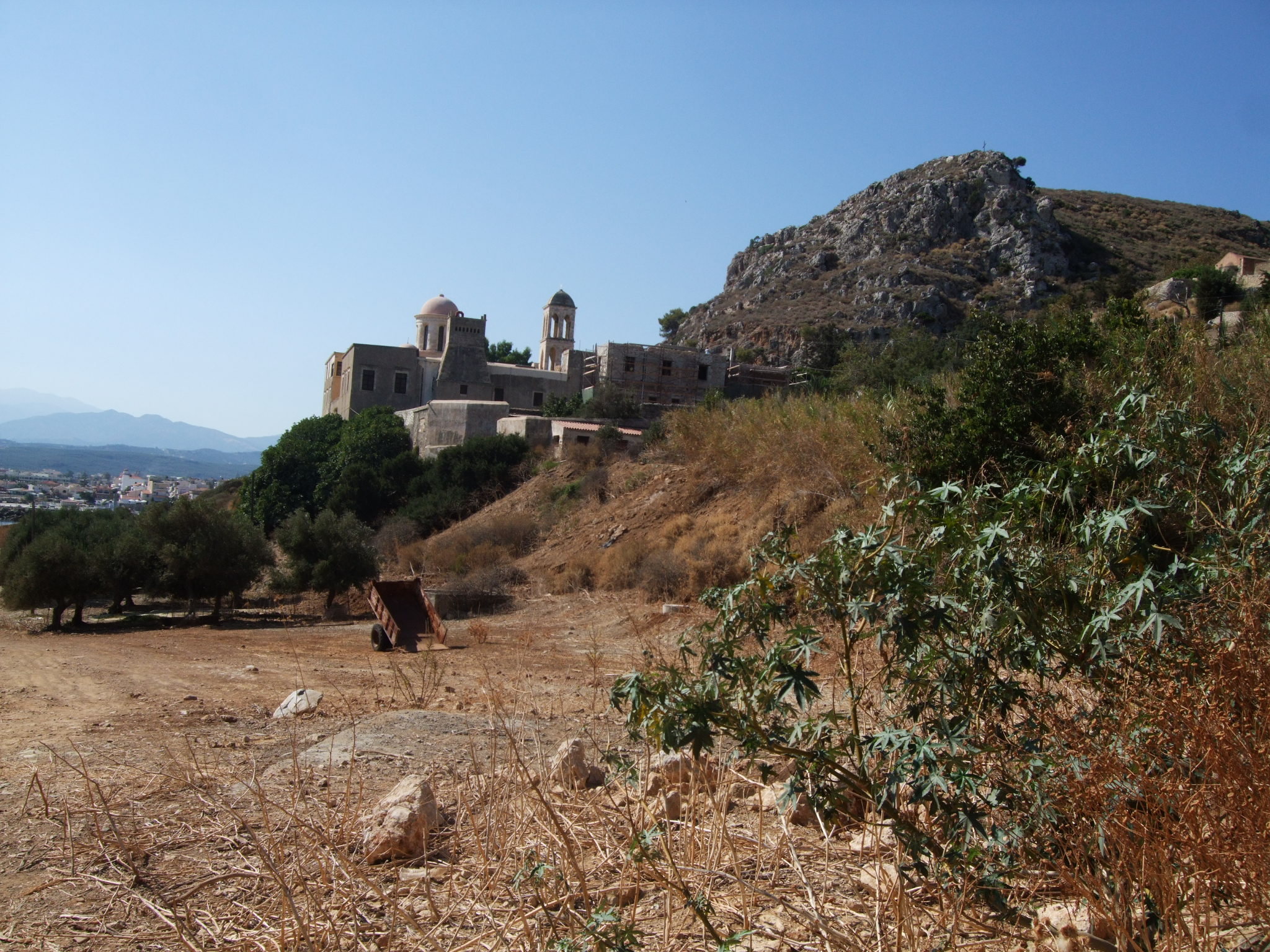 Monastyr Moni Gonias.